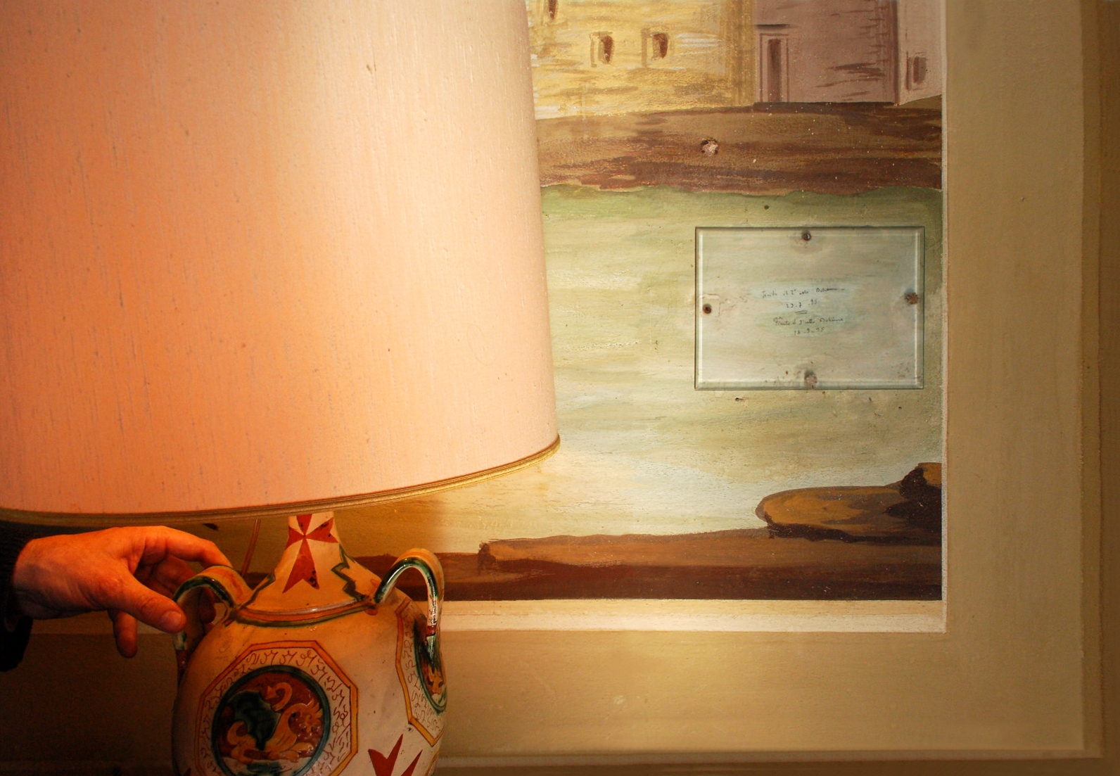 Villa del Castellaccio This is a photo of a monument which is part of cultural heritage of Italy.